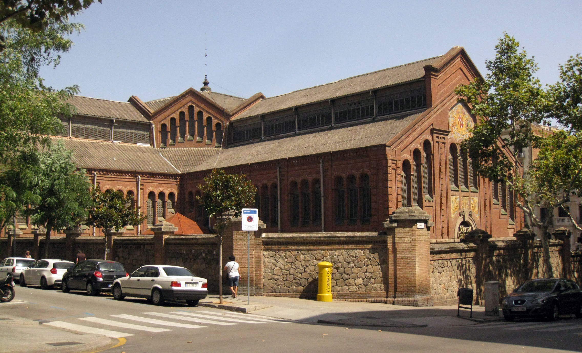 Mercat Galvany (Barcelona) Object location41° 23′ 47.82″ N, 2° 08′ 37.19″ E